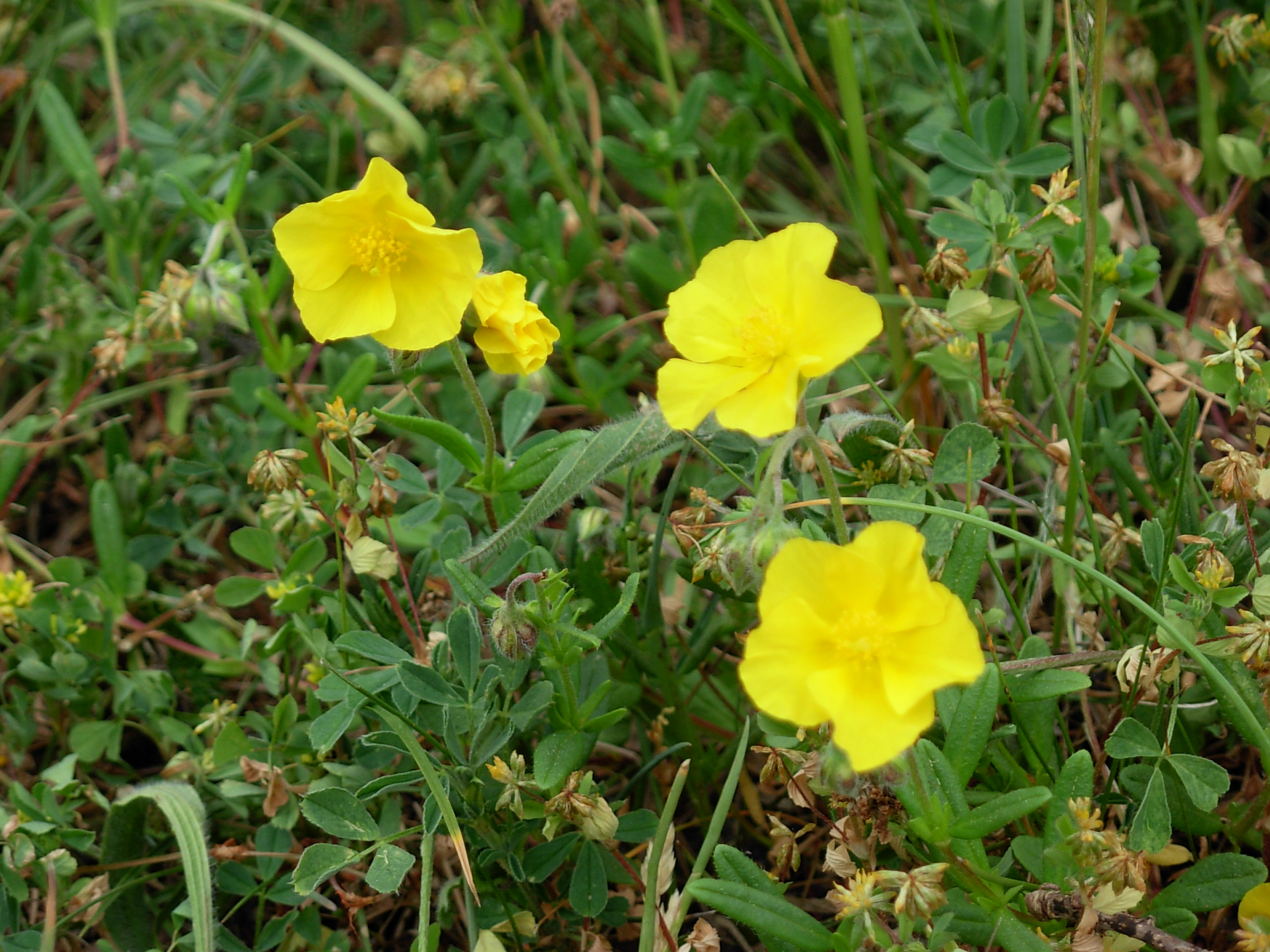 Ljus solvända nära Gråborg, Öland (Helianthemum nummularium)